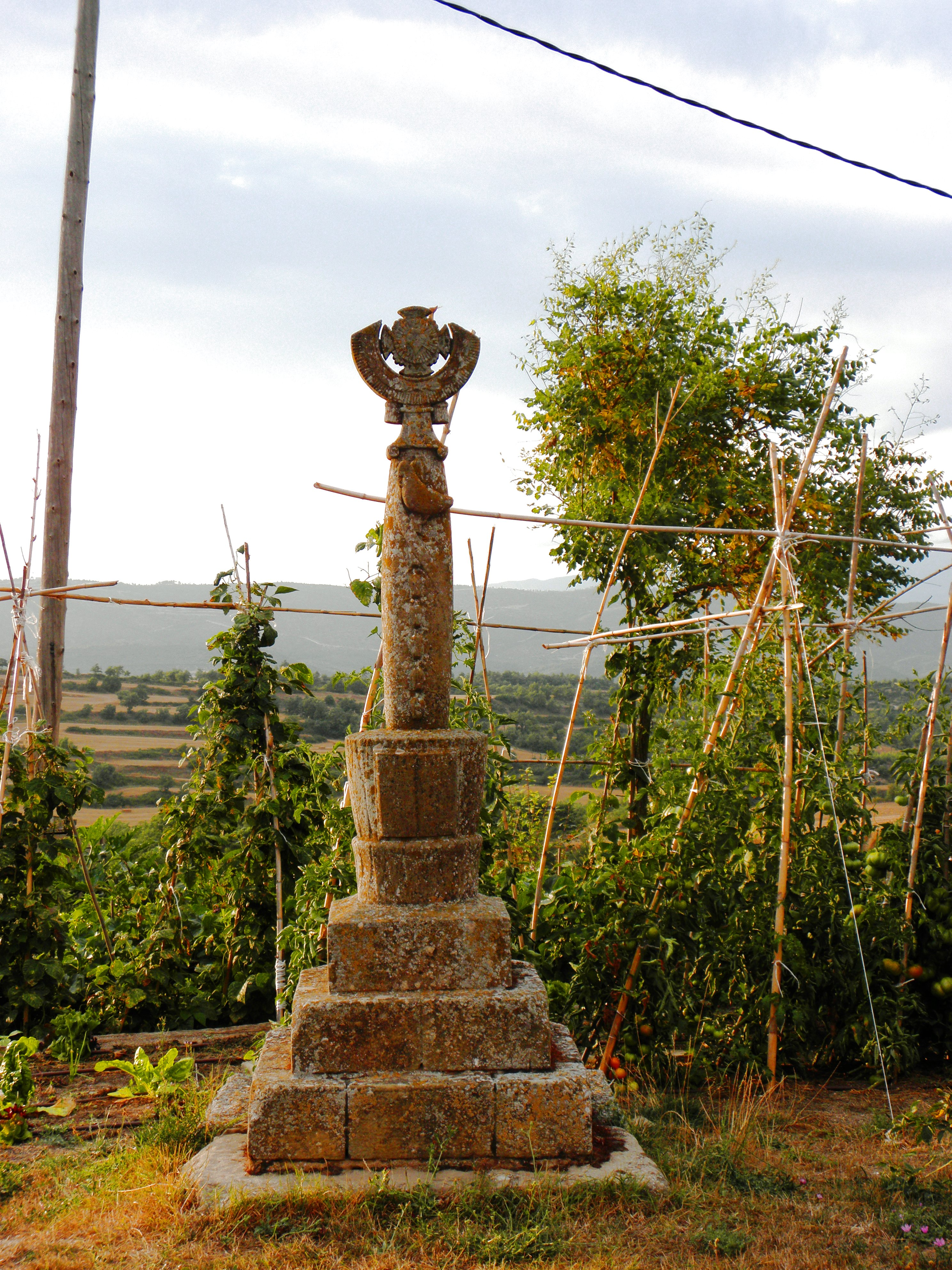 Prades de la Molsosa (La Molsosa, Solsonès). La creu de davant el cementiri vell.